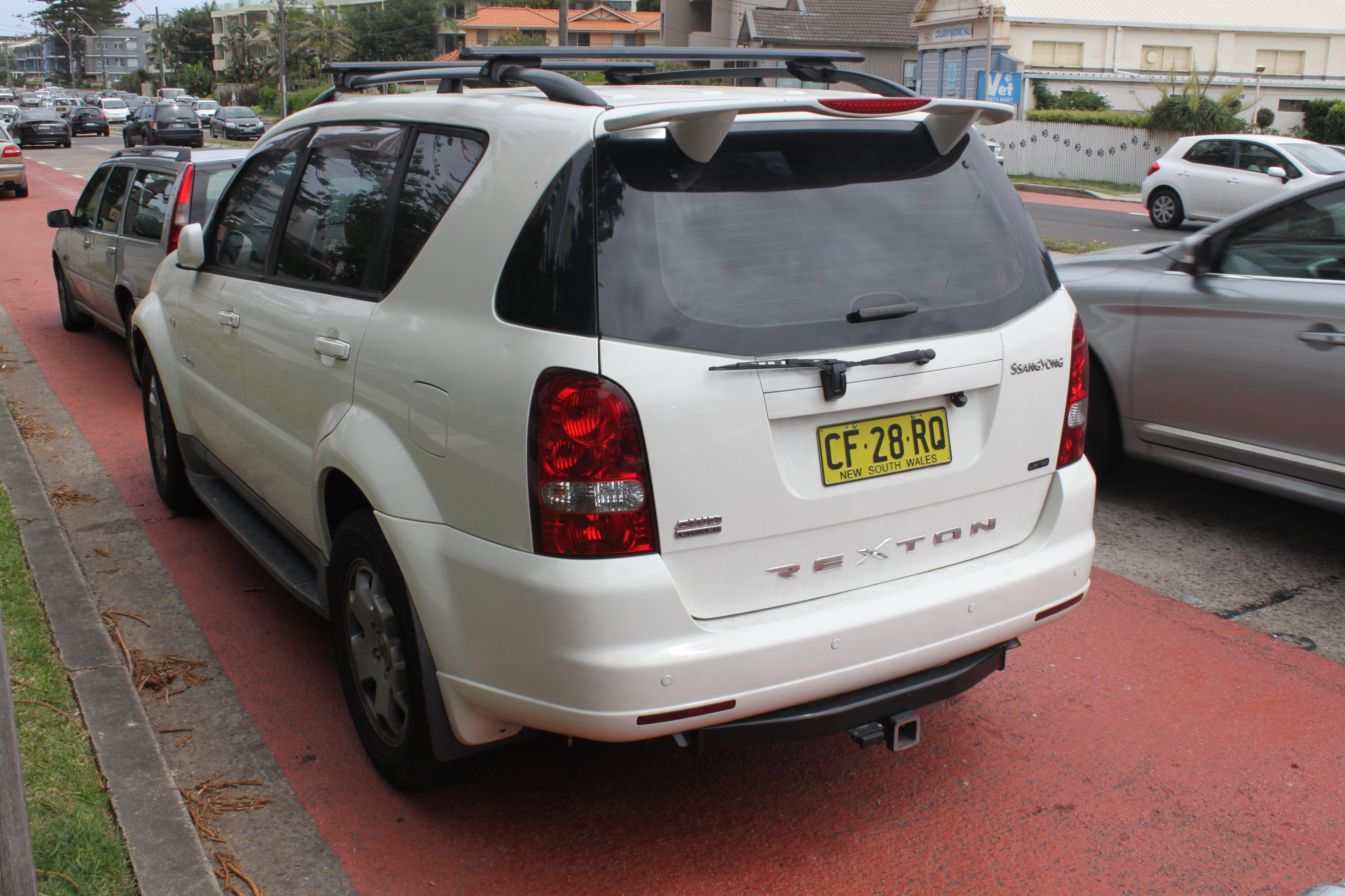 Ssangyong Rexton Y220 II RX270 Limited